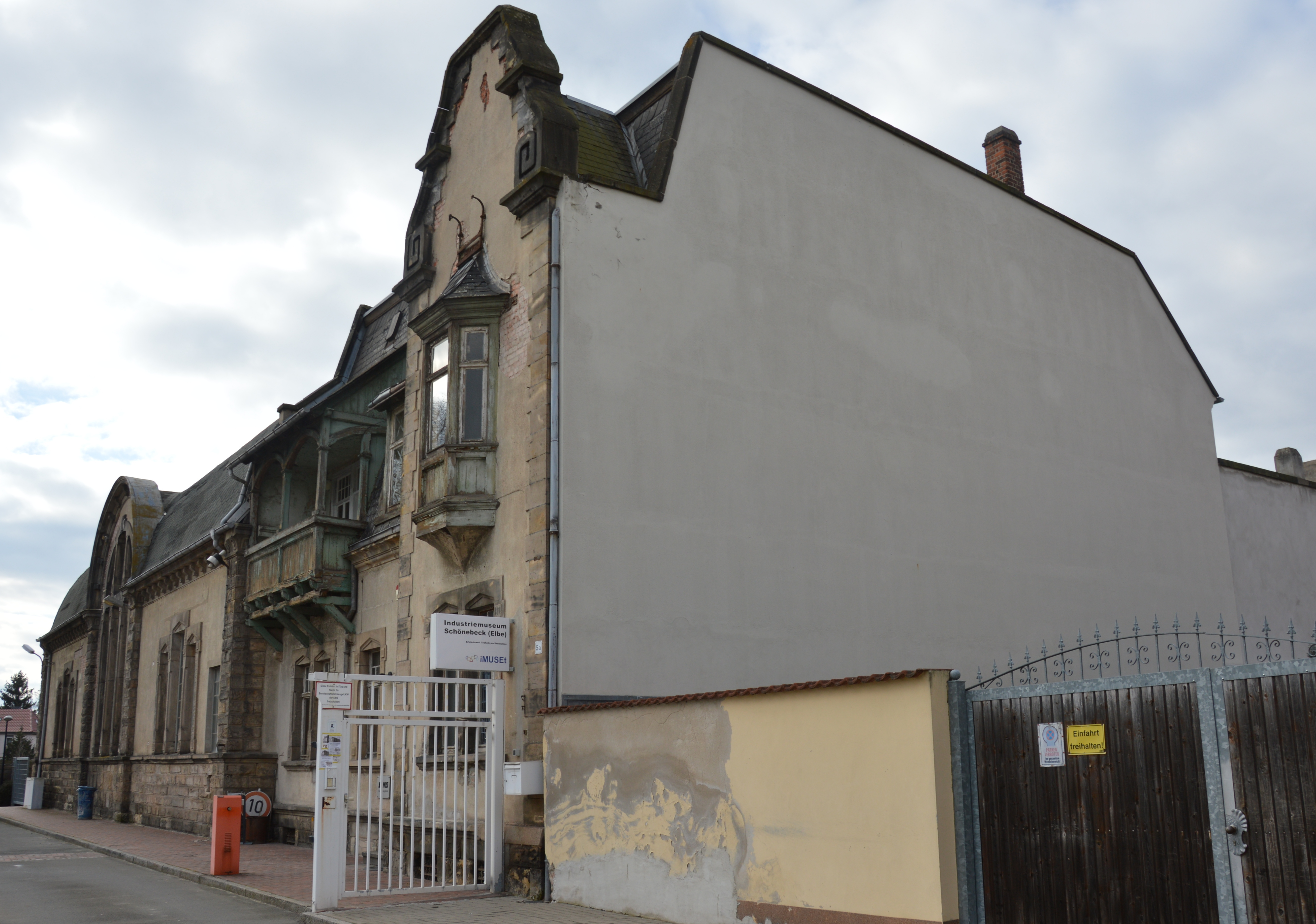 Umspannwerk Schönebeck